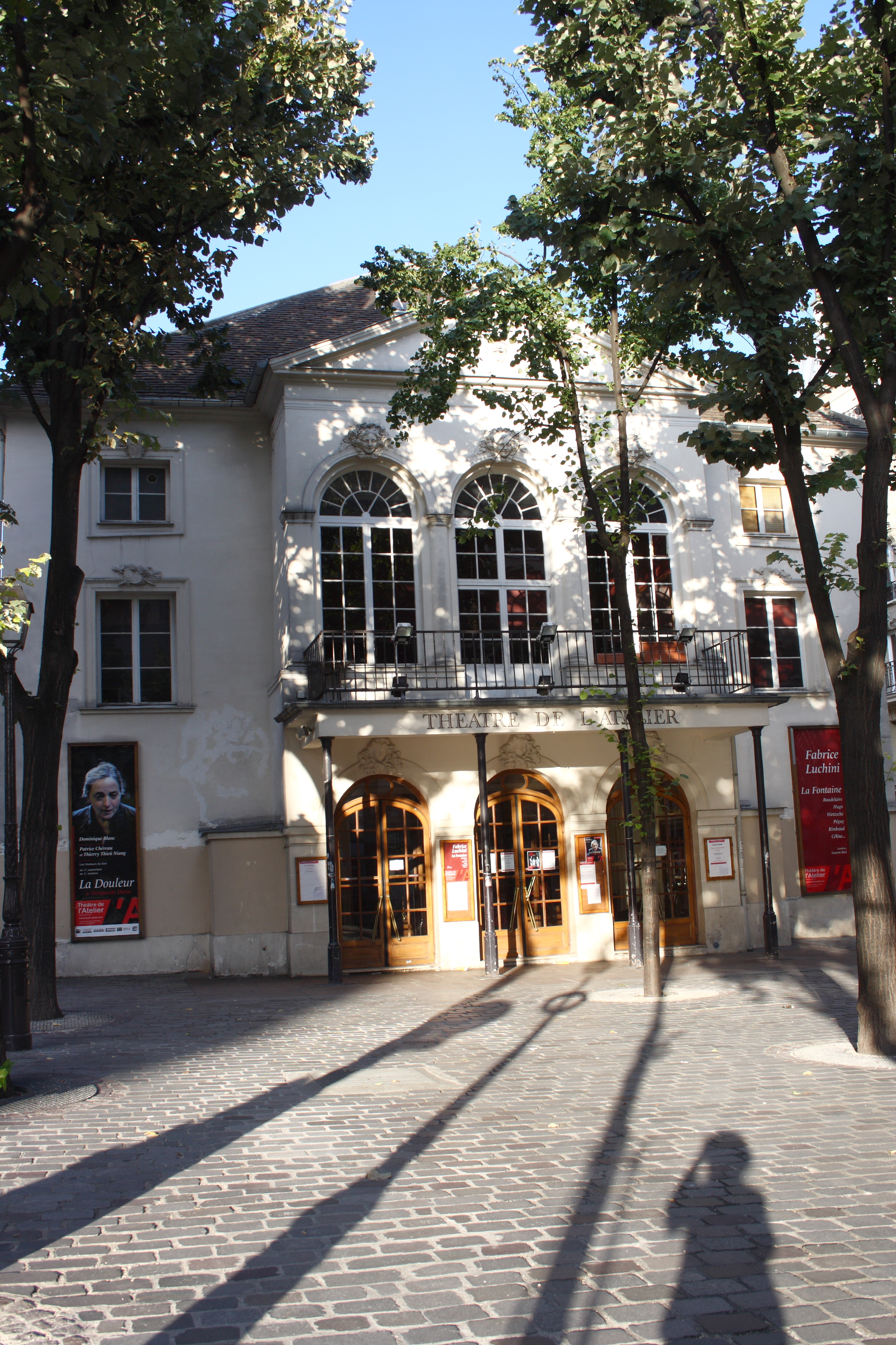 Théâtre de l'Atelier, 1, place Charles Dullin im 18. Arrondissement von Paris